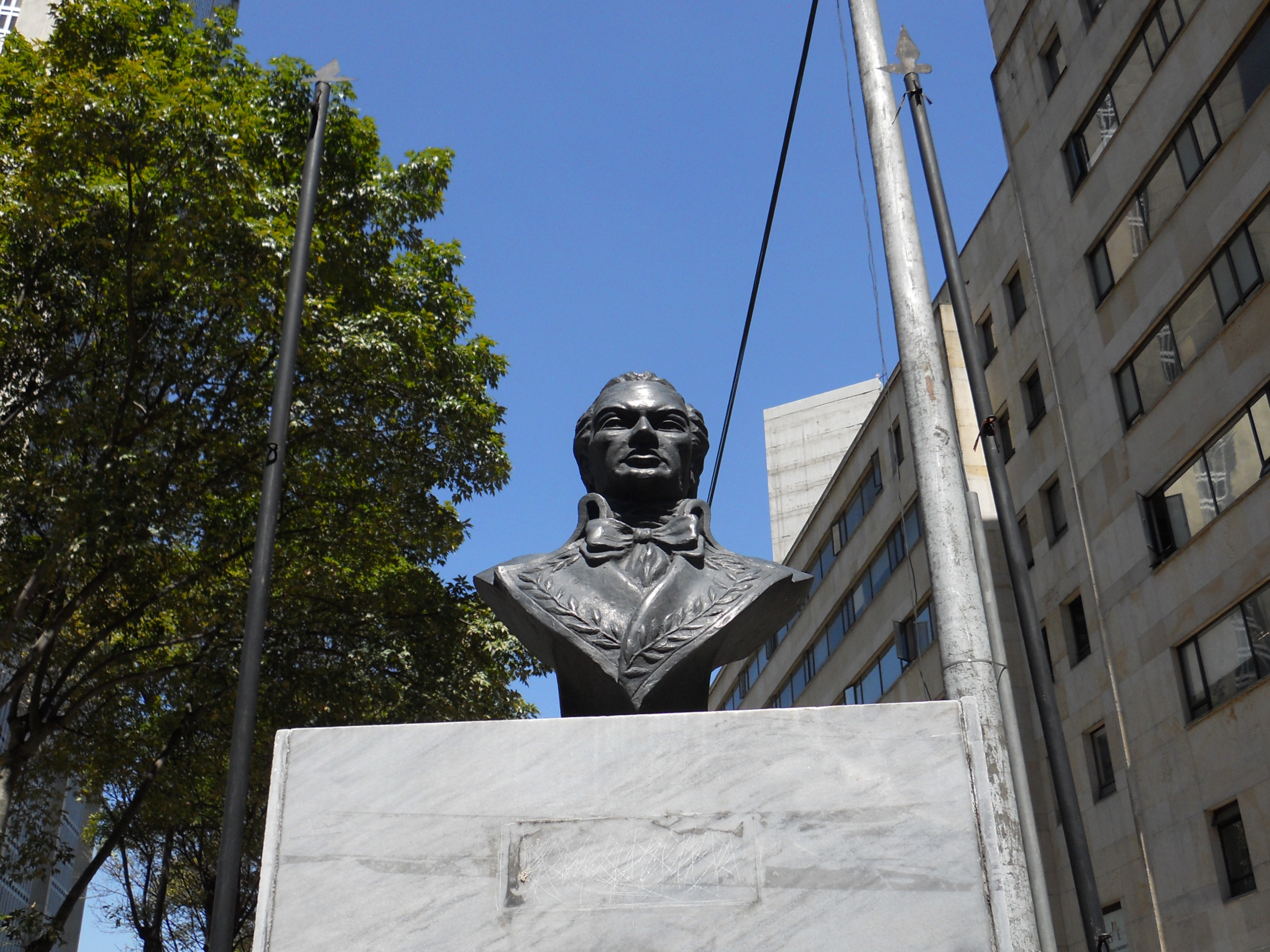 Busto de Francisco Miranda en la carrera Trece con calle Veintiocho. Barrio San Diego da la localidad de Santa Fe.